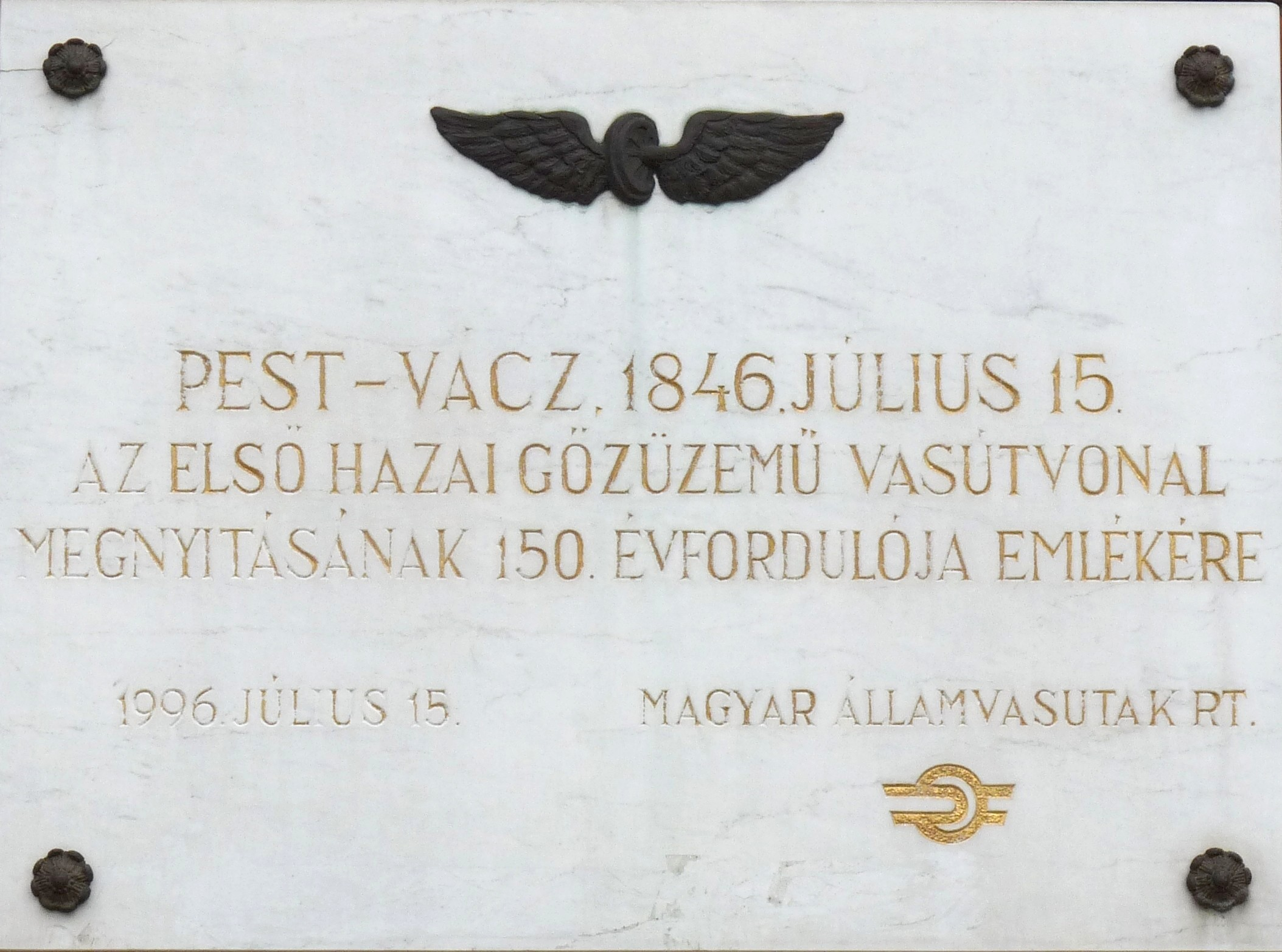 A Pest-Vác vasútvonal megnyitásának 150. évfordulója alkalmából elhelyezett emléktábla a Budapest-Nyugati pályaudvaron. Budapest, VI. kerület, Teréz krt. 55.